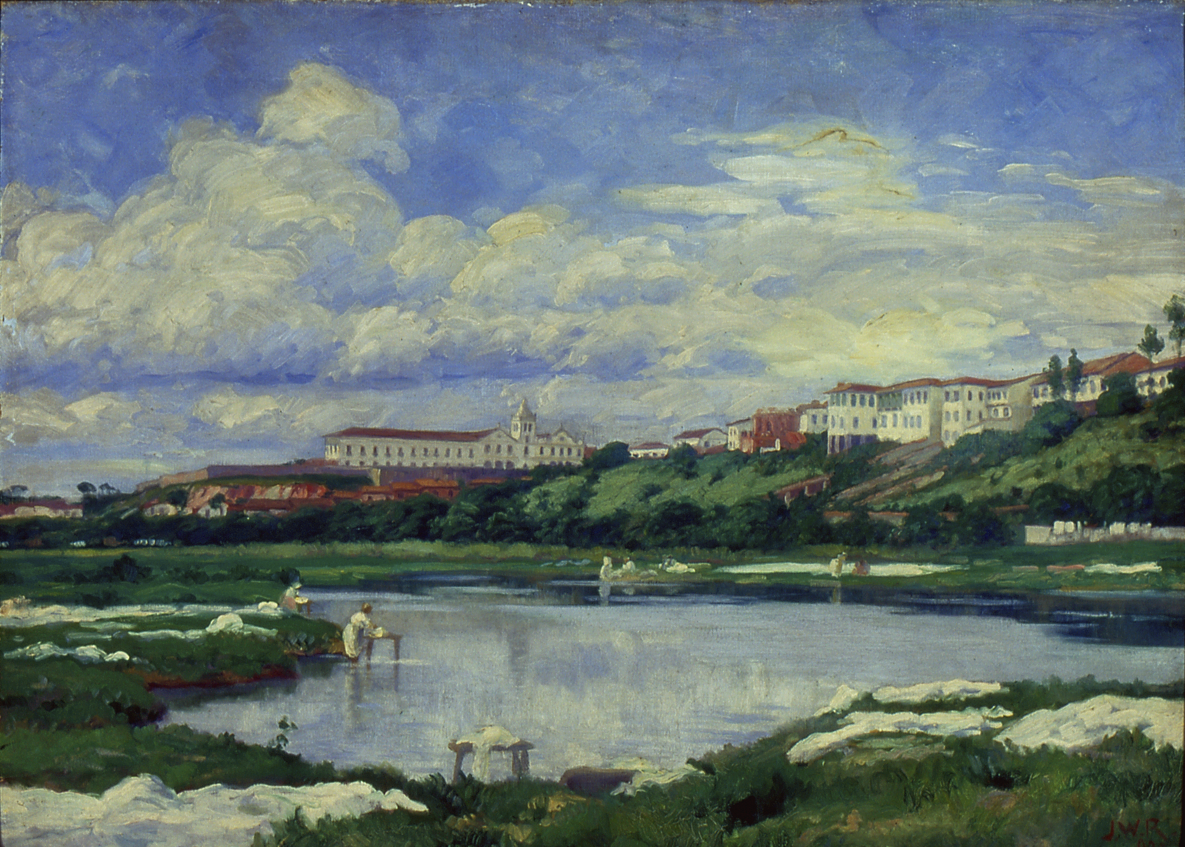 Obra que integra o acervo do Museu Paulista da USP. Coleção José Wasth Rodrigues - CJWR